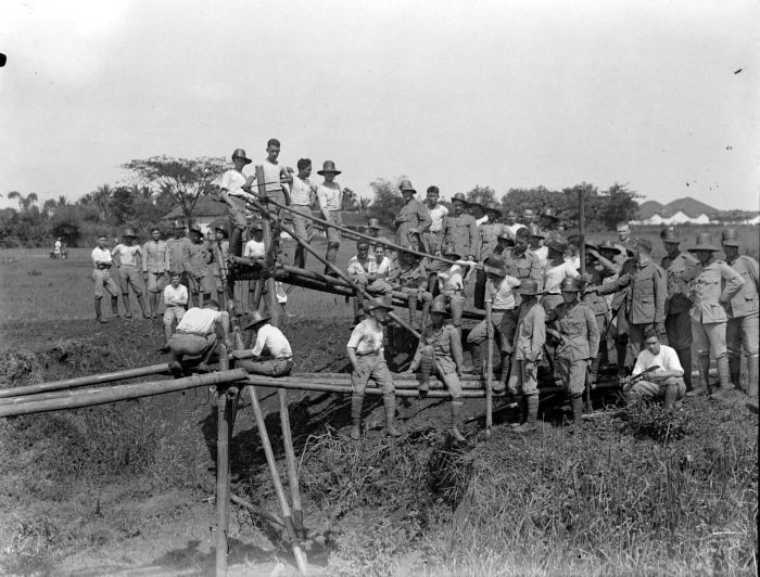 Negatief. De infanterie te Bandoeng